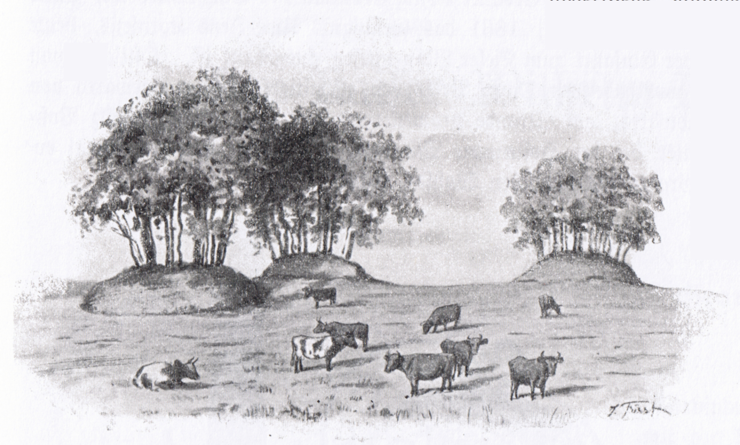 Hünengräber bei Dänischenhagen (Dänischer Wohld), Zeichnung von Julius Fürst .